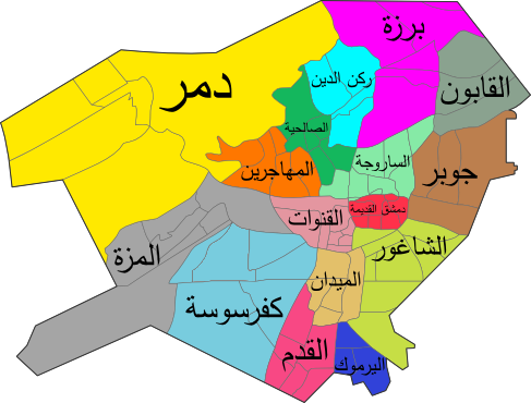 أحياء دمشق الستَّة عشر/مُحافظة دمشق، سوريا.